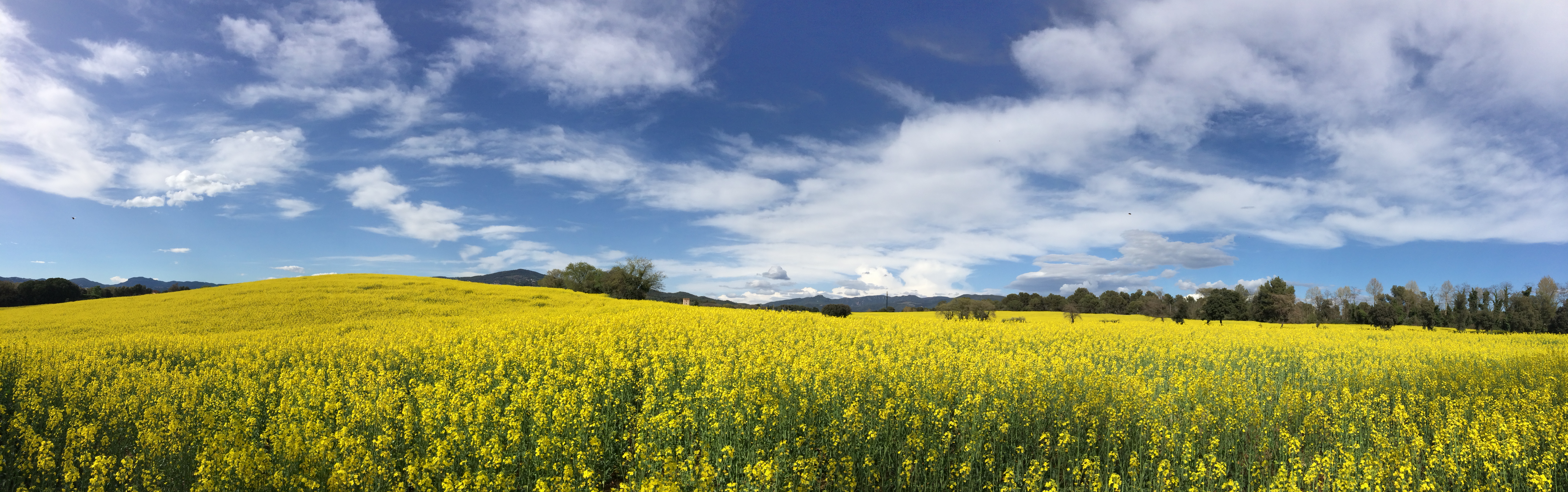 Camps de colza a Can Draper (L'Ametlla del Vallès. Catalunya)